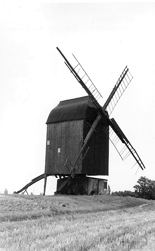 Original image description from the Deutsche Fotothek Ausleben-Ottleben. Mühle Trog, Bockmühle, Baujahr 1848